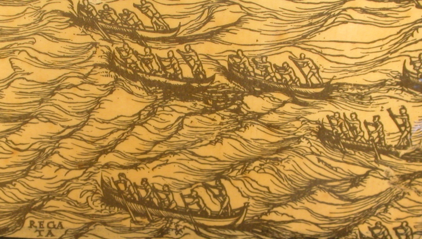 Jacopo De' Barbari - Venetie MD (particolare - regata)